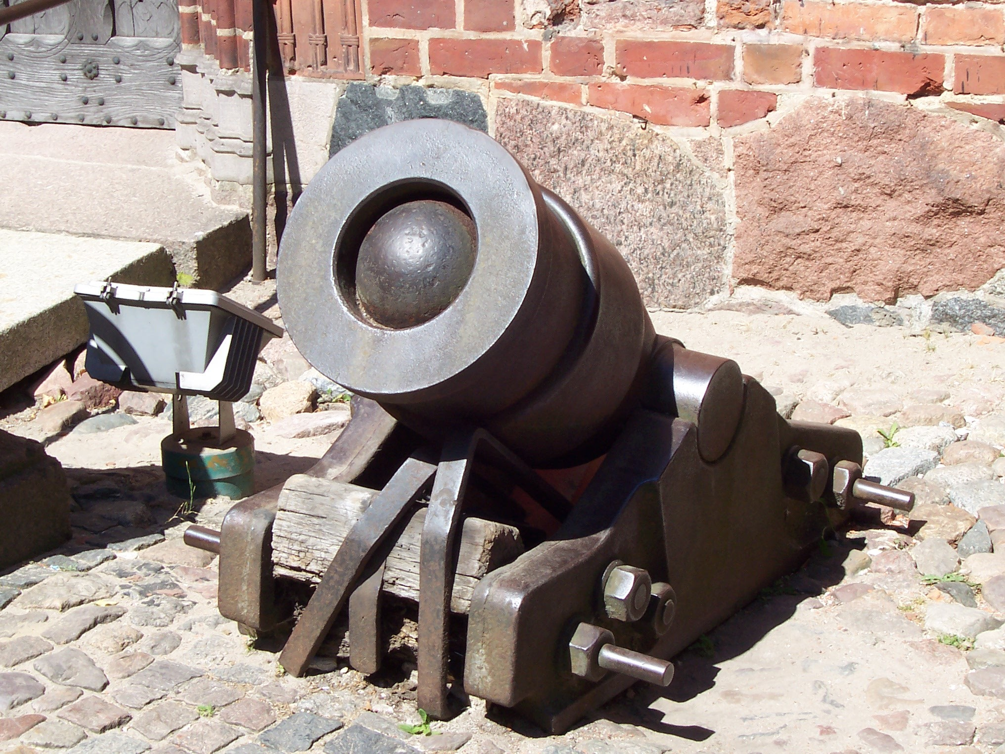 Bombarda - dziedziniec zameku sredniego, Malbork